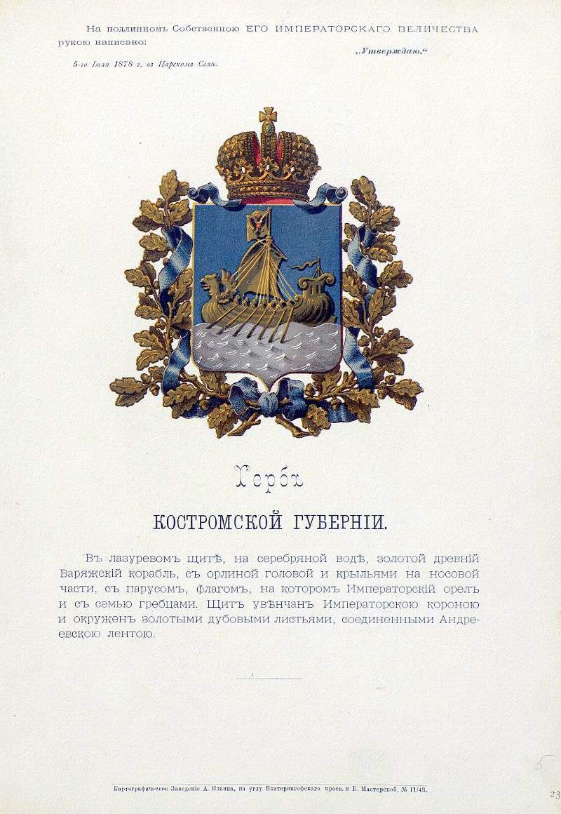 Official Russian Empire coat of arms Kostroma Governorate. Герб Российской Империи Костромской губернии с официальным описанием в Гербовнике Бенке. Утверждён Императором Всероссийским Александром Вторым.